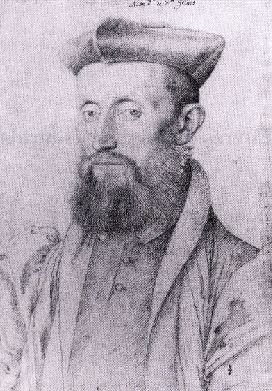 Mellin de Saint-Gelais (1490-1558), drawing by François Clouet